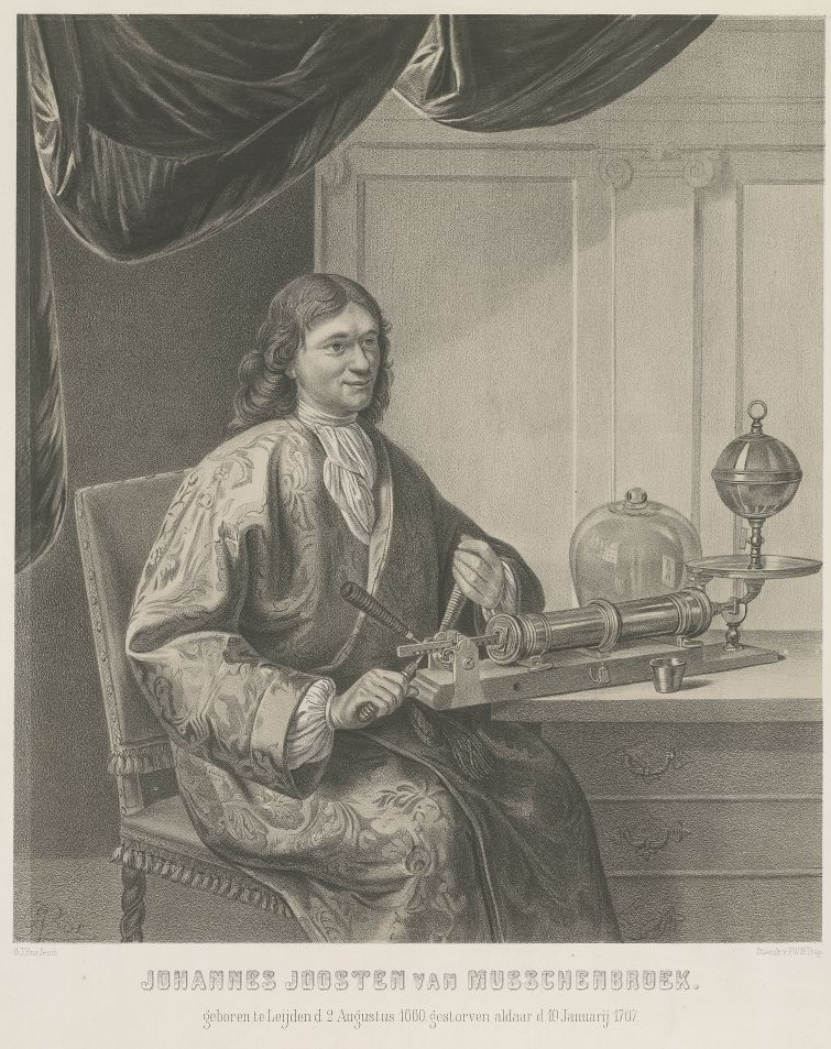 Portret van Johannes Joosten van Musschenbroek (Leiden 1660-1707). Natuurkundige. In kamerjapon, zittend aan een tafel, waarop een luchtpomp. Maker Gerardus Johannes Bos (Leiden 9-apr-1825 - Leiden 13-mei-1898) en Pieter Willem Marinus Trap (Leiden 20-apr-1821 - Leiden 20-okt-1905).